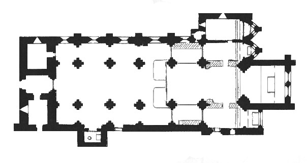 Prioratskirche Saint-Marcel bei Chalon-sur-Saône - Grundriss